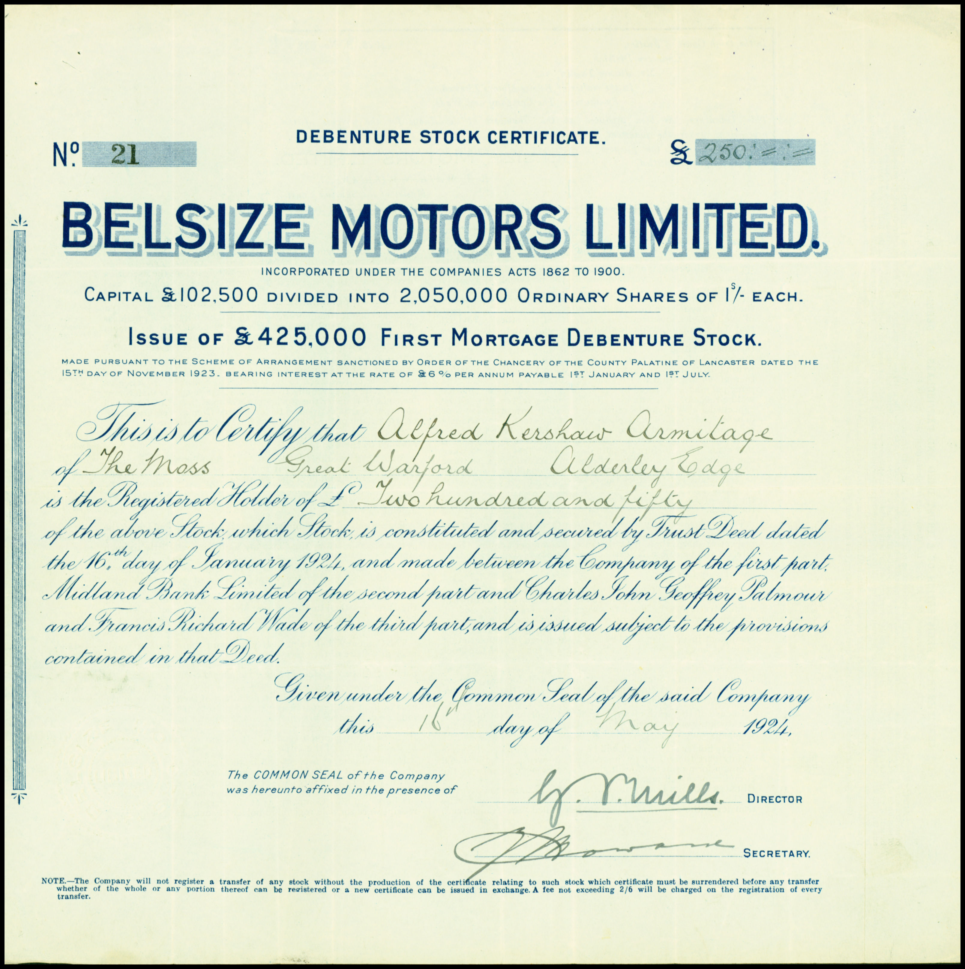 Anleihe der Belsize Motors Ltd vom 16. Mai 1924